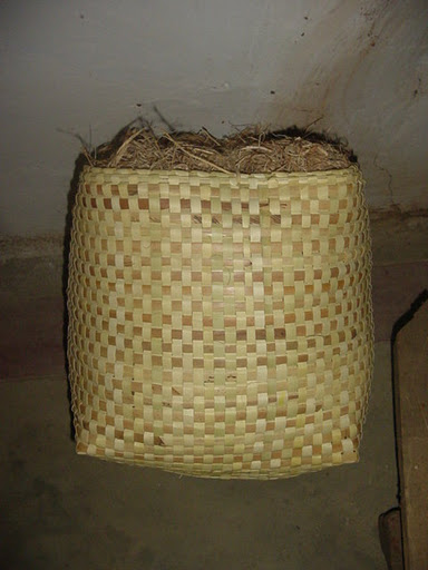 பனையோல் செய்யப்படும் பெட்டி